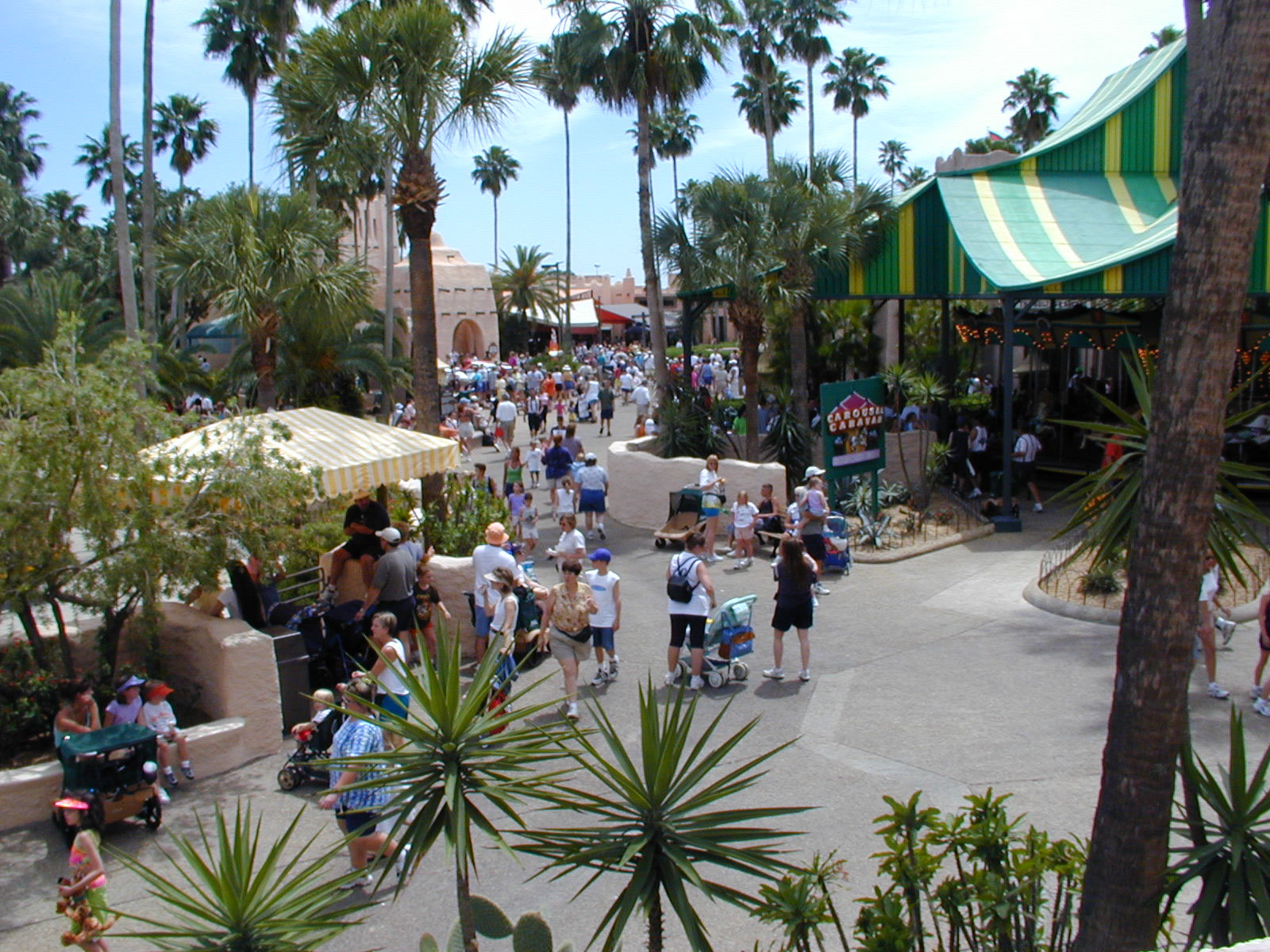 Busch Gardens, Tampa, April 11, 2001.